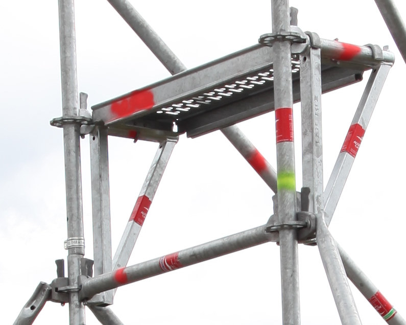 Allroundgerüst/Modulgerüst mit Keilkopf und Lochscheibe. Hersteller: Fa. Altrad